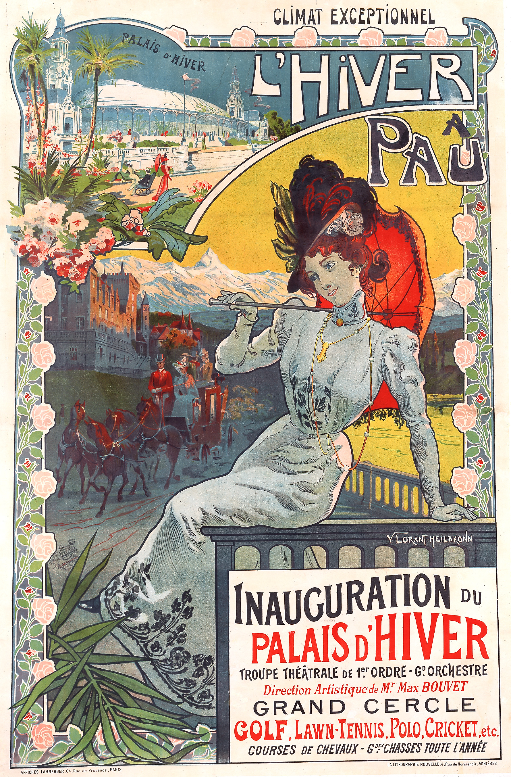 Affiche réalisée pour l'inauguration du Palais d'Hiver de Pau (1900), actuel Palais Beaumont